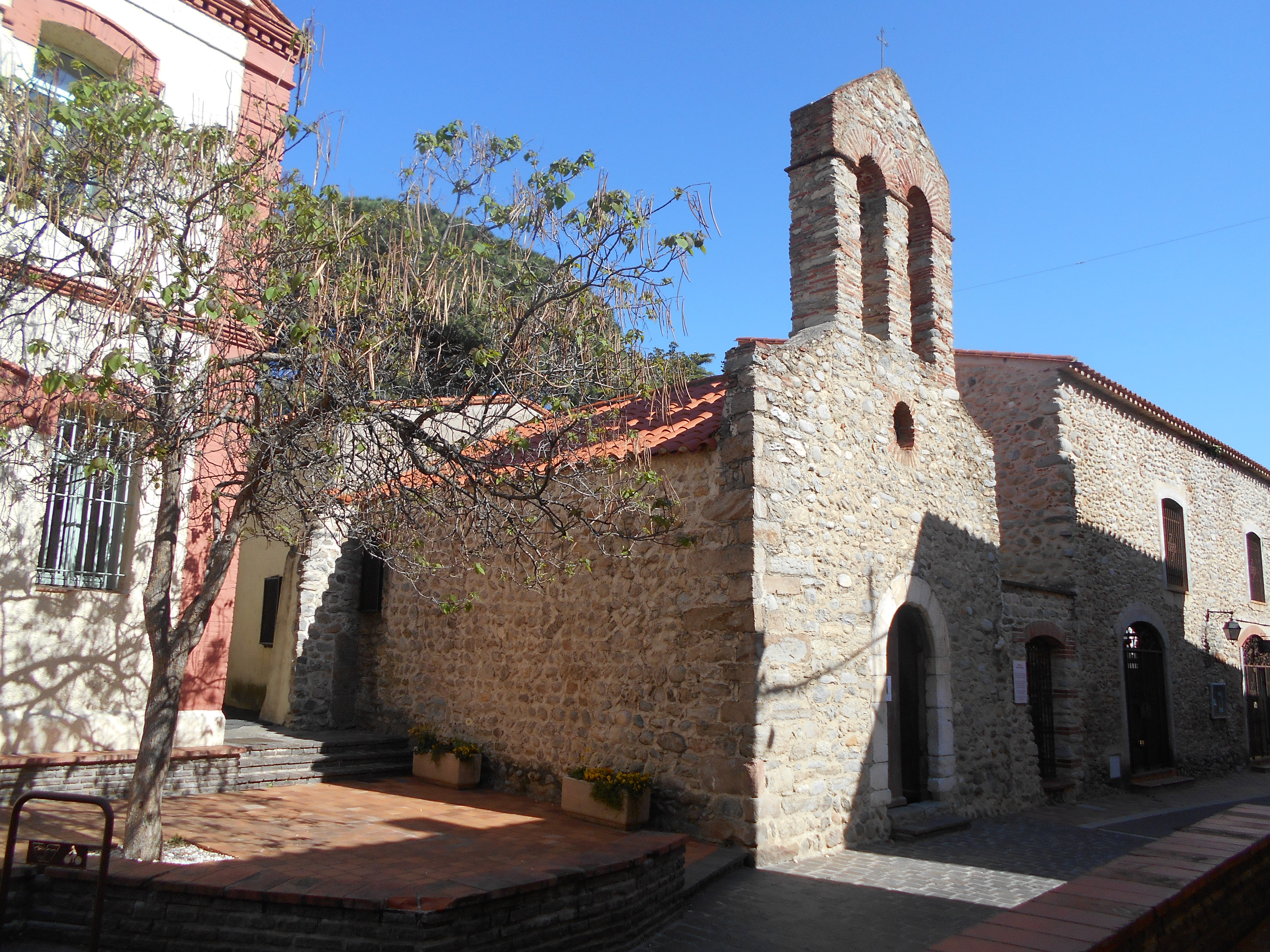 Capella de Sant Antoni del Voló